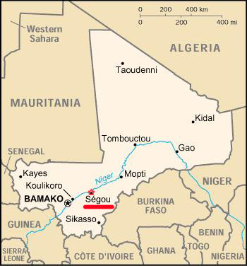 Mapa de Mali resaltando la ciudad de Segou